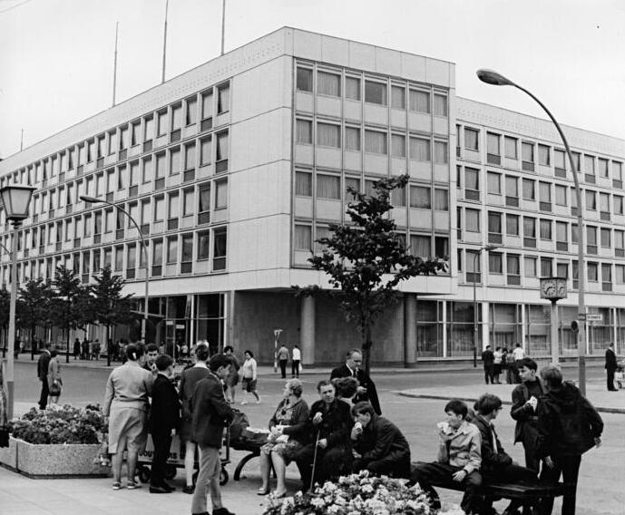 Berlin, Unter den Linden, "Ministerium für Volksbildung" Zentralbild Pech-25.7.69 Berlin: Das Haus des Ministeriums für Volksbildung der DDR Unter den Linden Ecke Otto-Grotewohl-Straße.